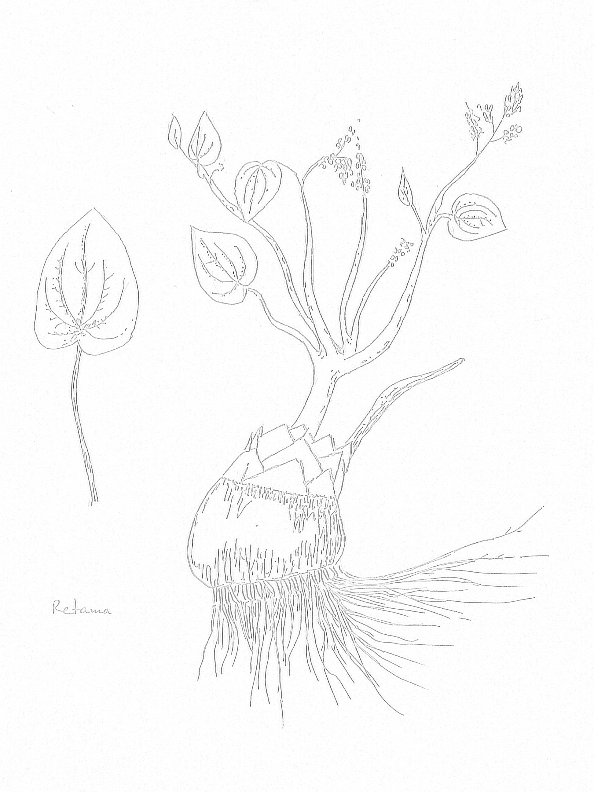 Borderea pyrenaica Miègeville, F. Dioscoreaceae